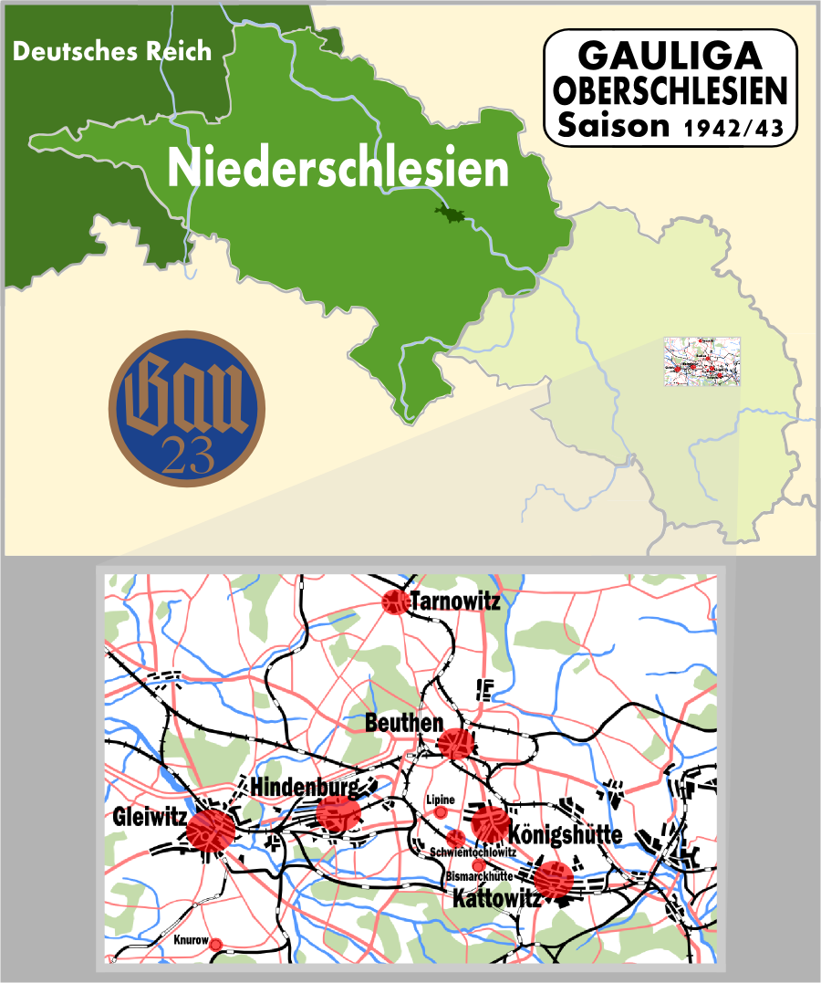 Spielorte der Gauliga Oberschlesien 1942/43.